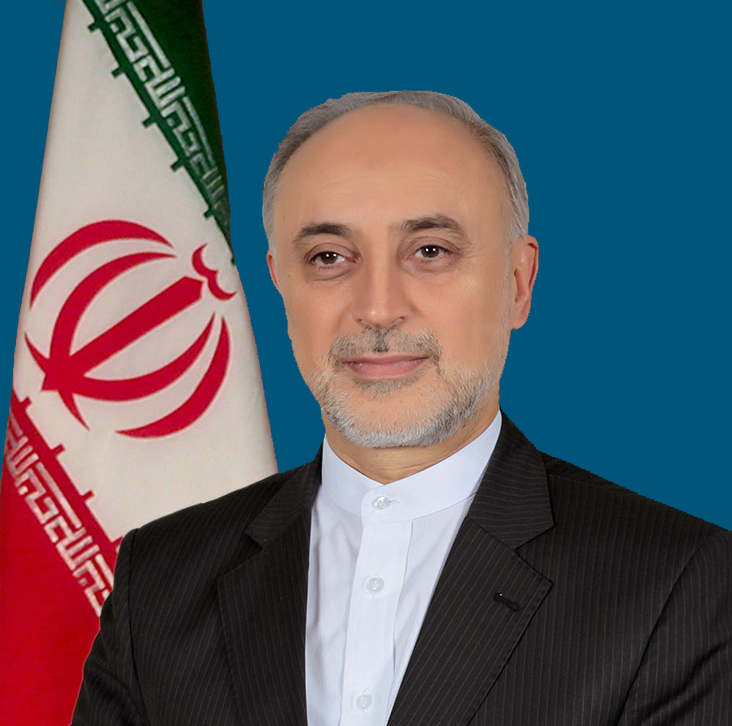 دکتر علی اکبر صالحی رئیس سازمان انرژی اتمی ایران